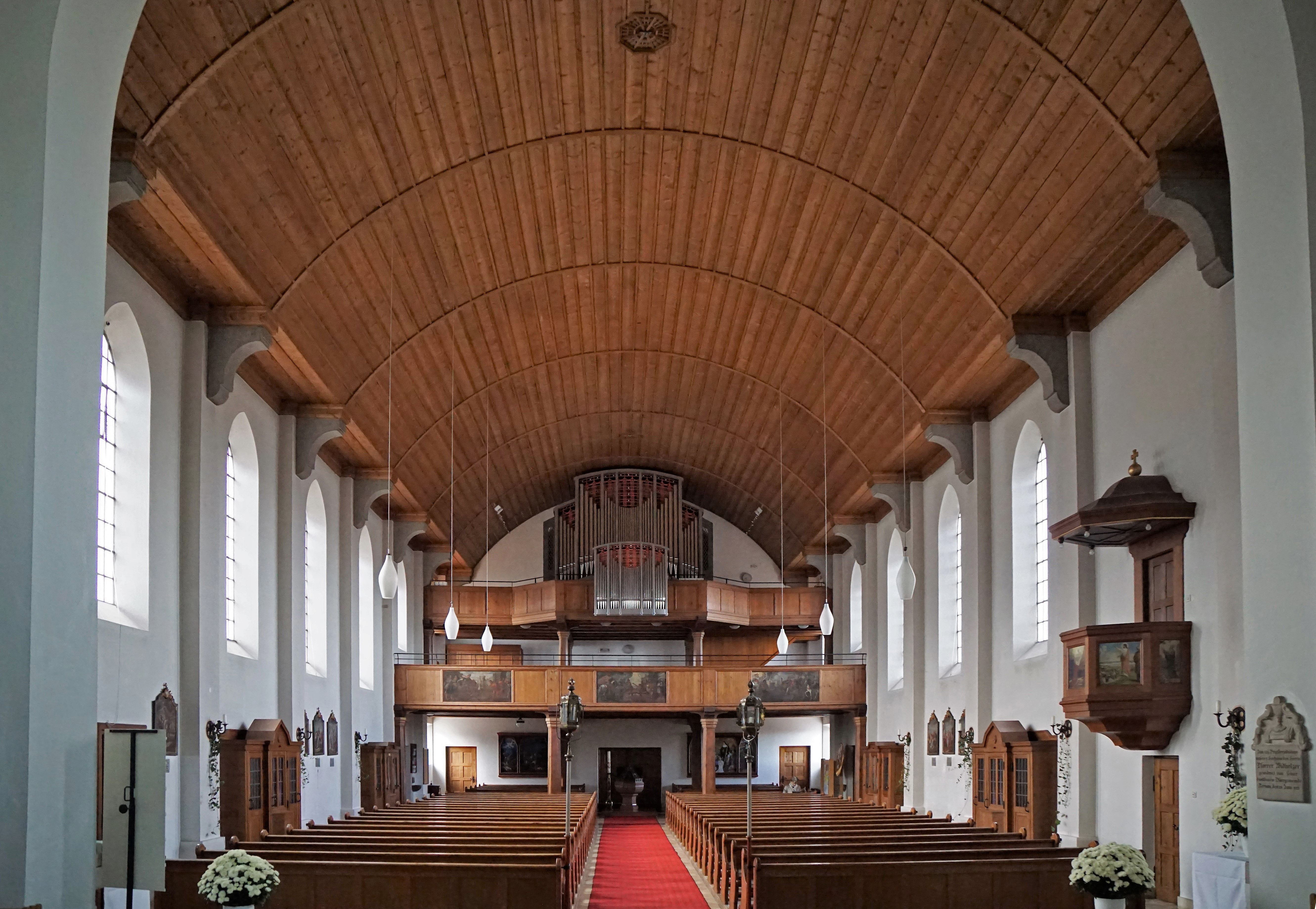 Kath. Pfarrkirche Bernau, Innenansicht gegen die Orgelempore